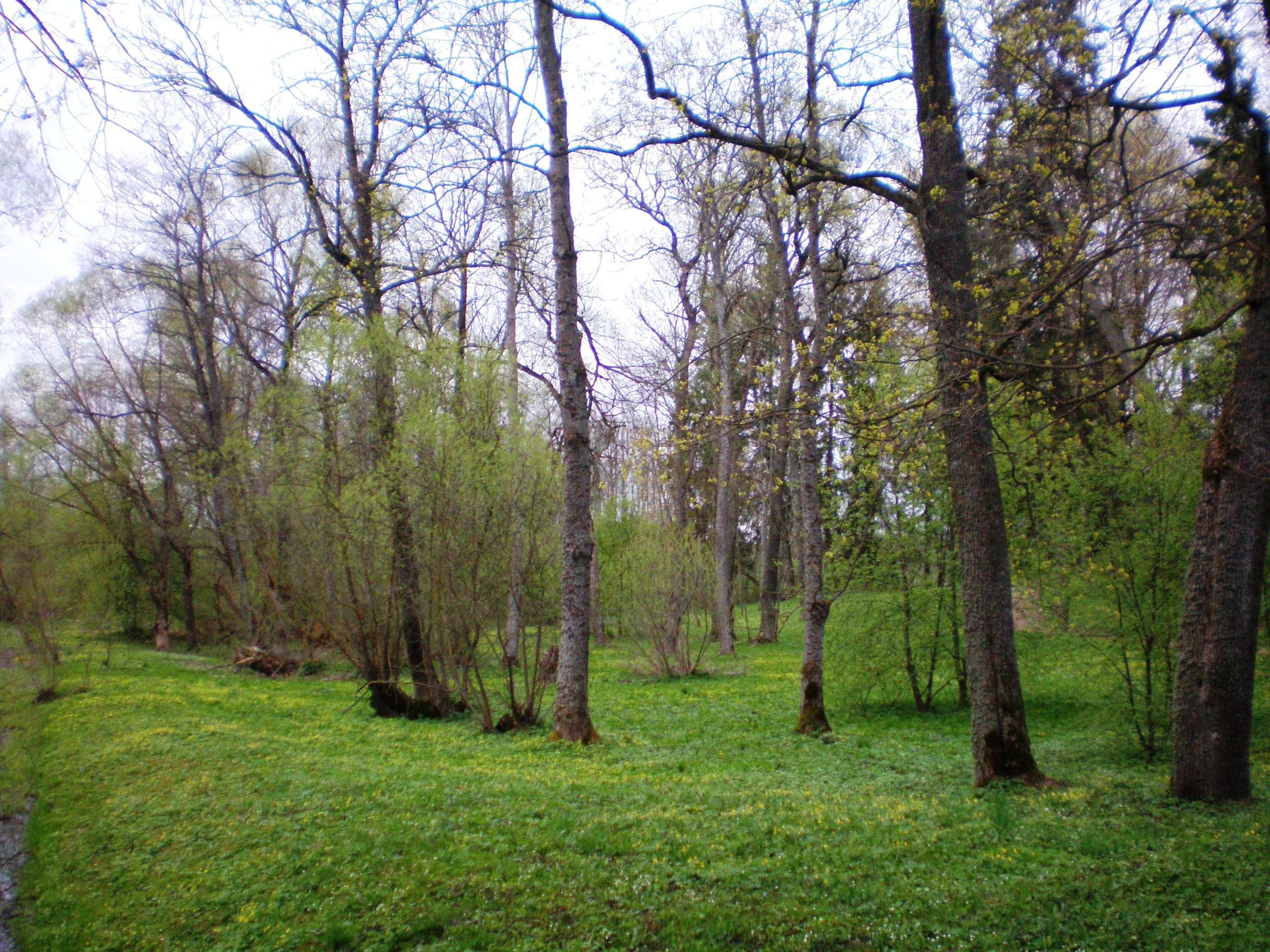 Alantos dvarko parkas Naujasodyje, Molėtų raj. 2007.05.04 Foto: Hugo.arg